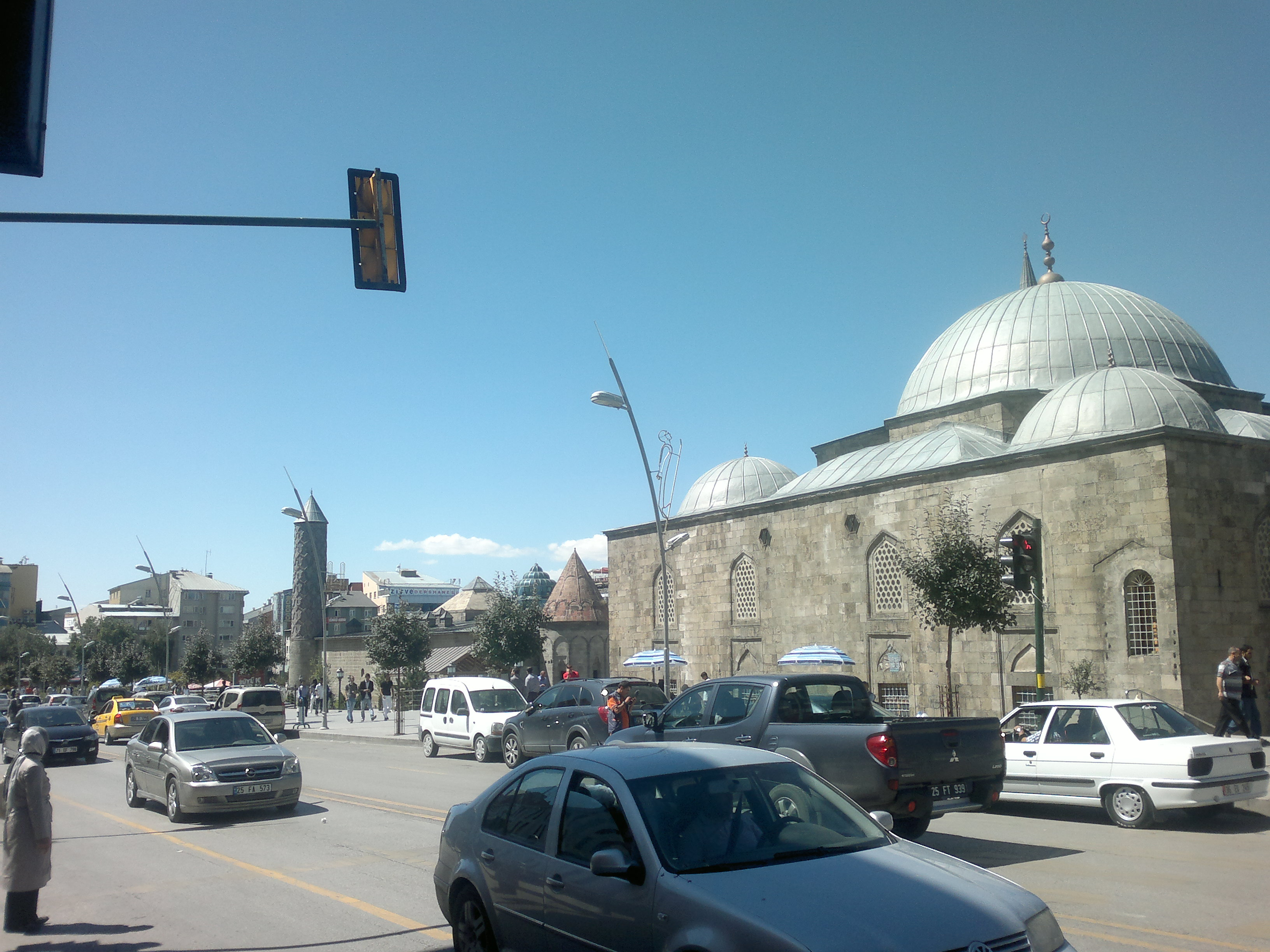 Erzurum Lala Mustafa Paşa Camii, Türkiye'de Erzurum İli merkez ilçesi Yakutiye'de 1562 yılında Lala Mustafa Paşa tarafından yaptırılmış Erzurum ’daki ilk Osmanlı camisidir.